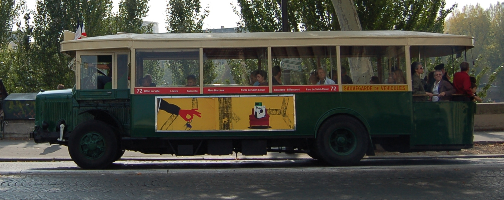 Ancien Bus parisien circulant à l'occasion des Journées du Patrimoine 2009